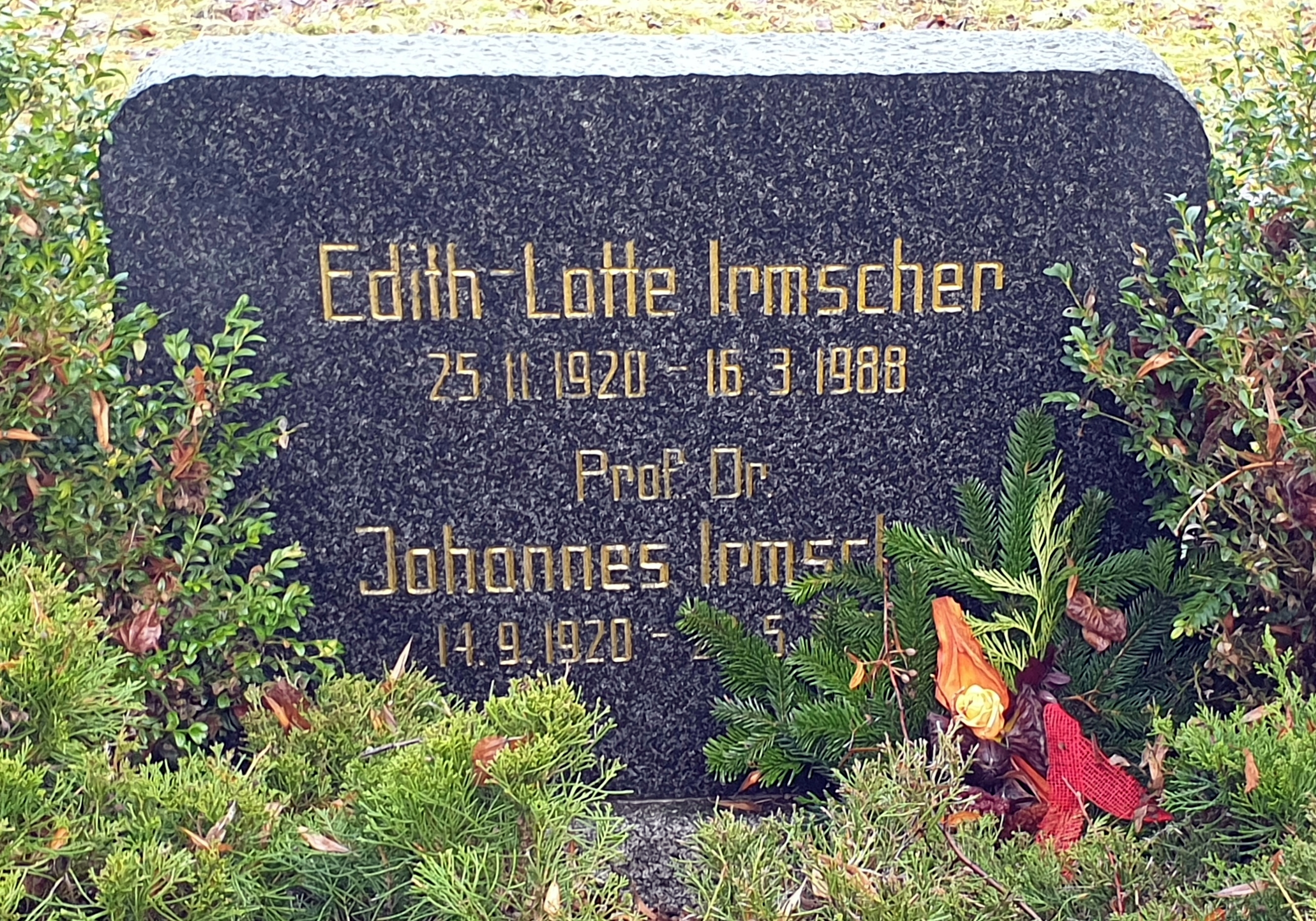 Grab auf dem ev. Friedhof Berlin-Rosenthal